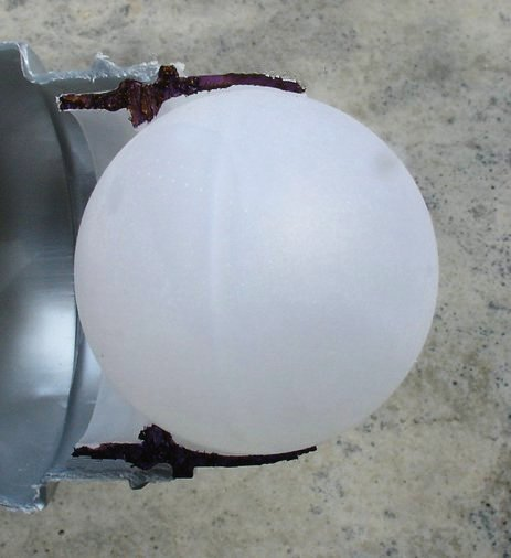 Cross section through the head (holding a ball) of roll-on antiperspirant. Przekrój przez zamek przytrzymujący kulkę, która reguluje wypływ antyperspirantu.